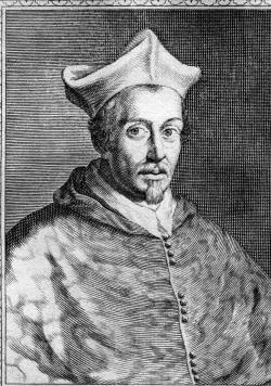 Cardeal Agapito Colona